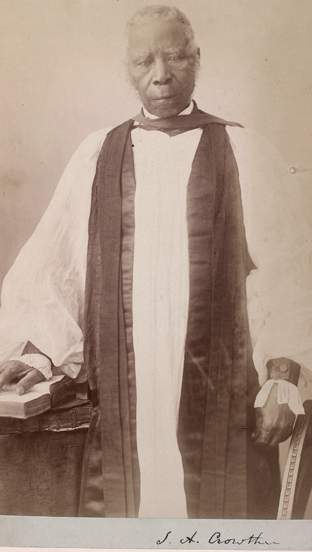 O bispo anglicano Samuel Ajayi Crowther, na Lambeth Conference, 1867